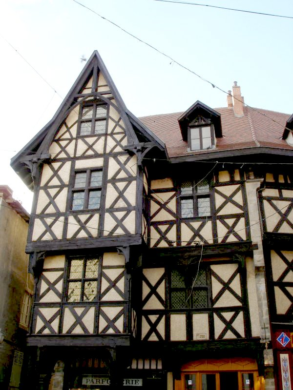 Château du Pirou, vieille ville de Thiers